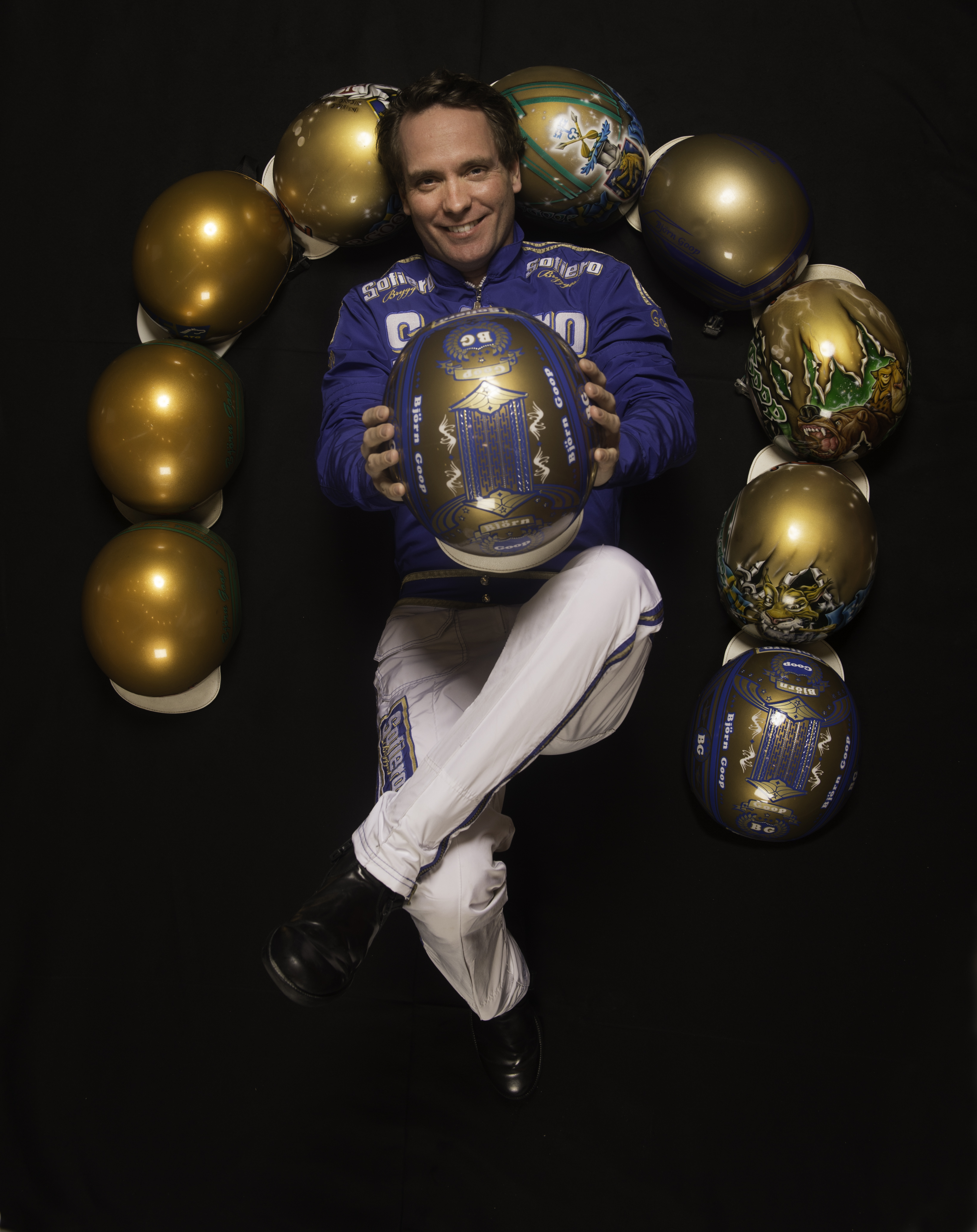 Travkusken Björn Goop har blivit rikschampion tio år på raken. Rikschampion blir den som vinner flest segrar i Sverige under ett år. Belöningen är en guldfärgad hjälm.